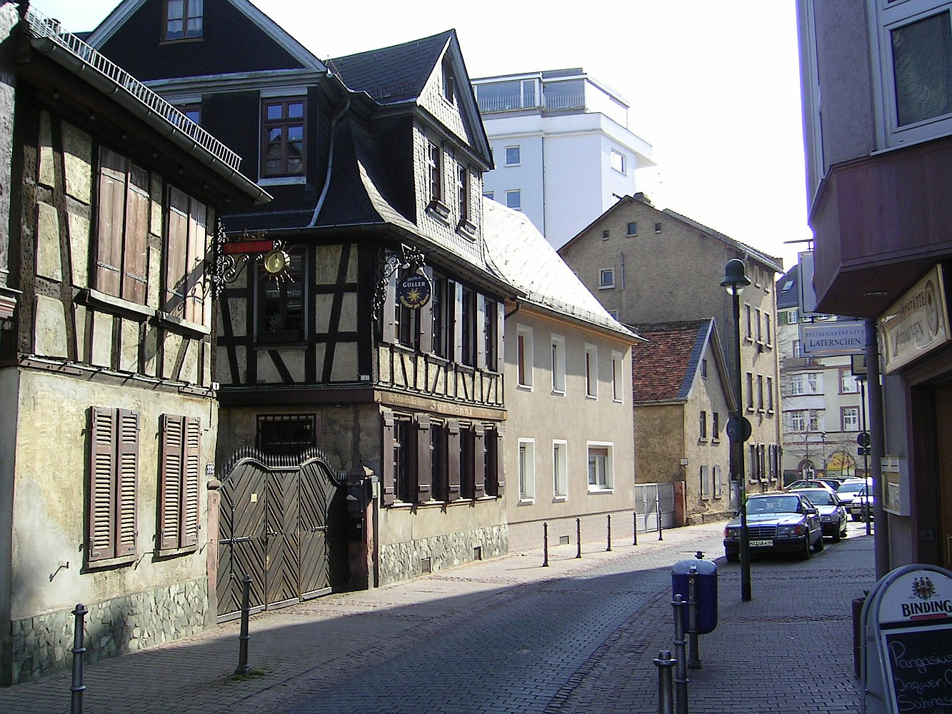 Die nördliche Berger Straße im Stadtteil Frankfurt-Bornheim